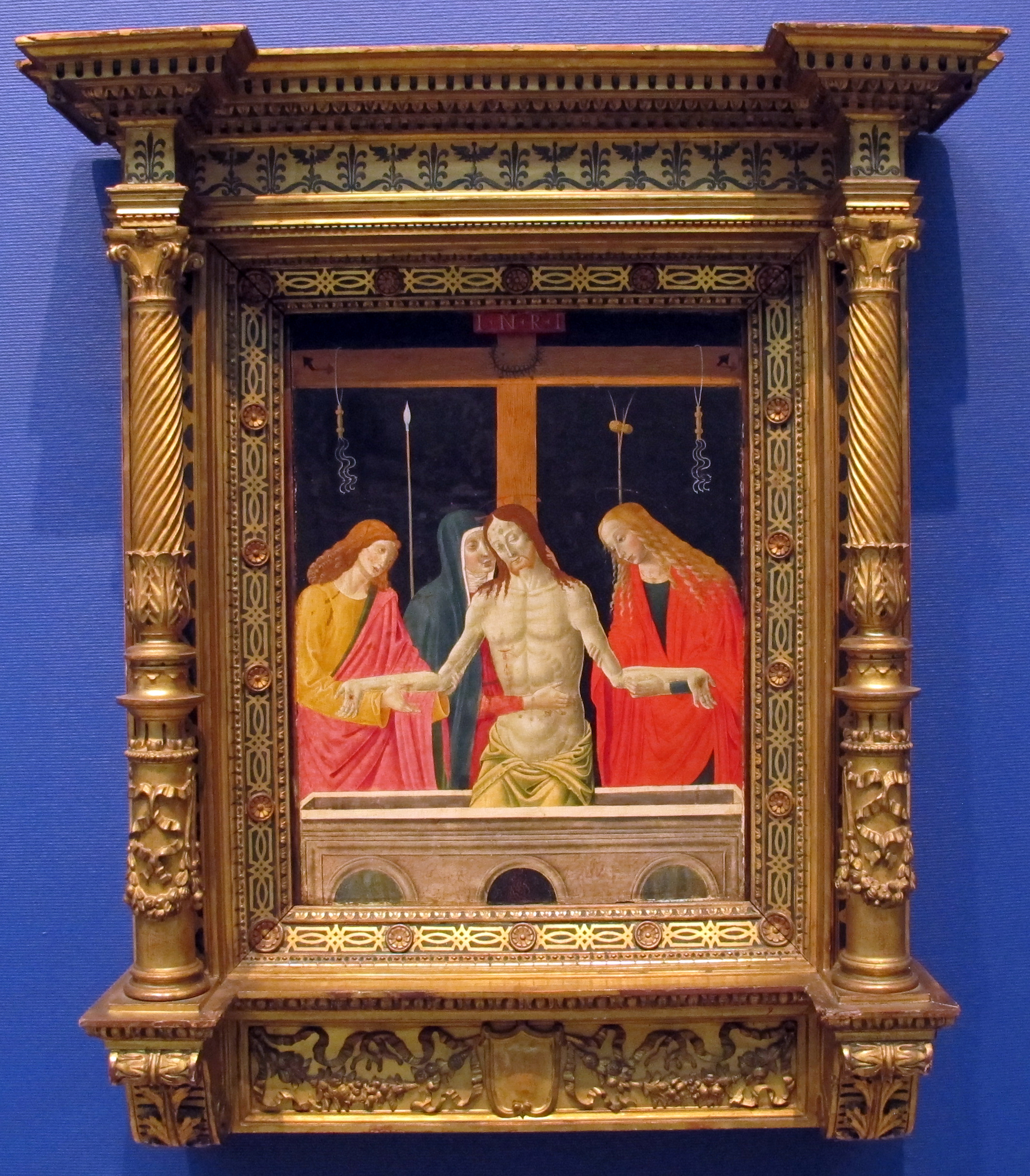 imago pietatis